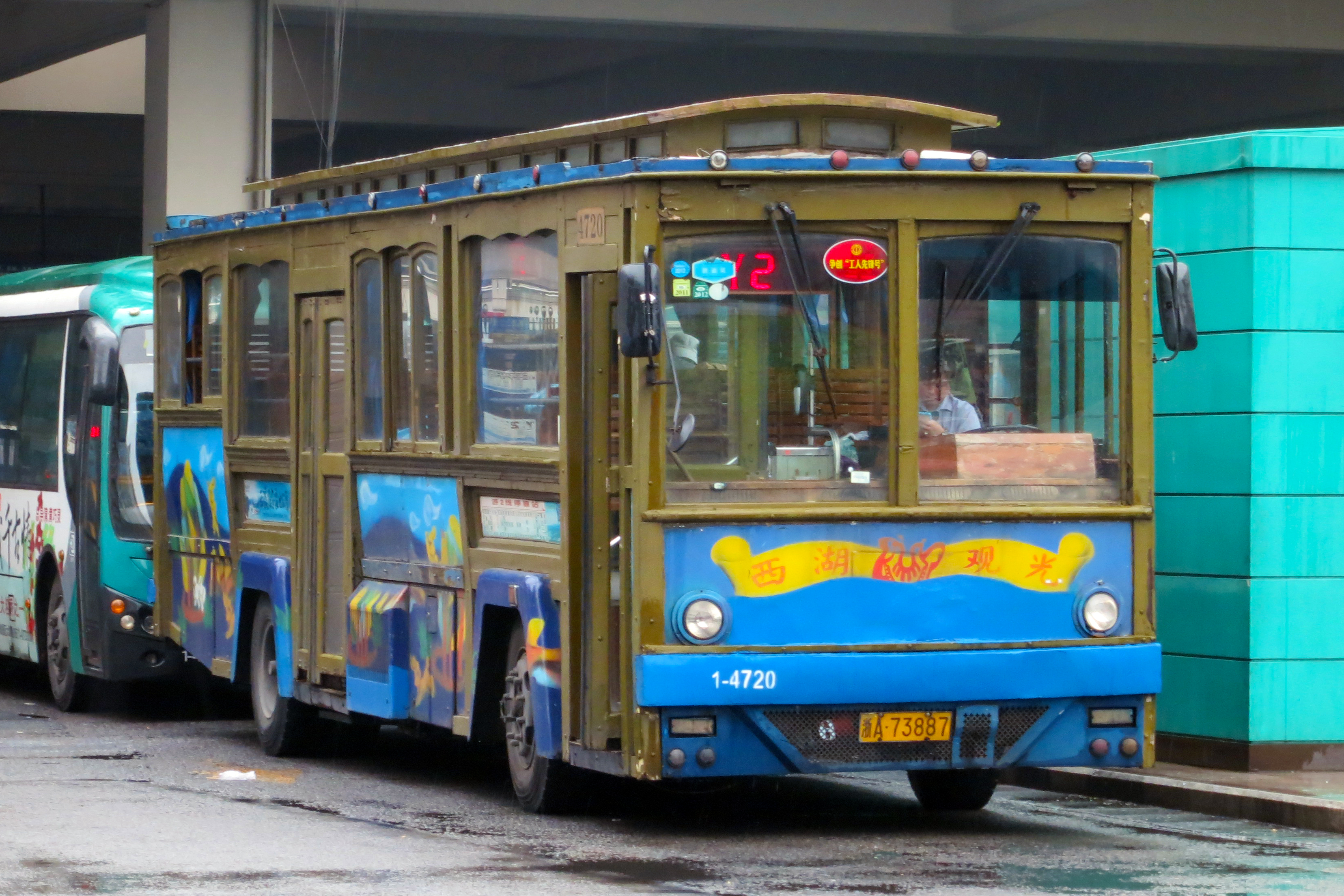 Hangzhou Bus Y2 | HuangHai | DD6112H8F | JiangCheng Road 杭州公交游2路 | 丹東黃海客車 | DD6112H8F | 江城路 城站火車站